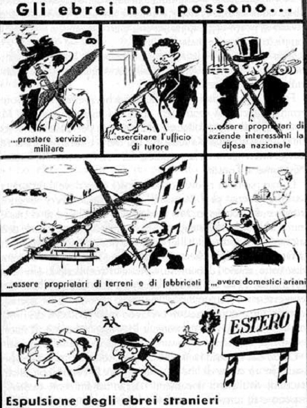 Gli ebrei non posso...(vignetta illustrativa sulle leggi razziali fasciste)